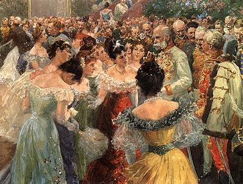 Hofball in Wien; Aquarell, 49.8 x 69.3 cm